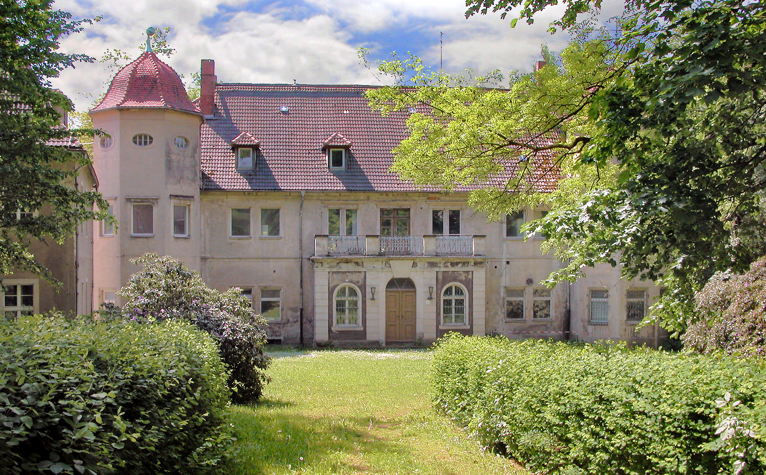 24.05.2006 09661 Gersdorf (Striegistal) Gersdorf 23 (GMP: 51.060445,13.212449): Schloß Gersdorf wurde vermutlich in der 2. Hälfte des 16. Jahrhunderts erbaut. Um 1890 Umbau für Dietrich Karl und Caroline Johanna von Carlowitz. In der DDR Bezirksschule des FDGB, Lehrlingswohnheim und zuletzt Internat der Fachschule für Schwermaschinenbau Roßwein. Schloß von Norden, Eingangsseite. Hier Leerstand (2006). [DSCN10214.TIF]20060524085DR.JPG(c)Blobelt